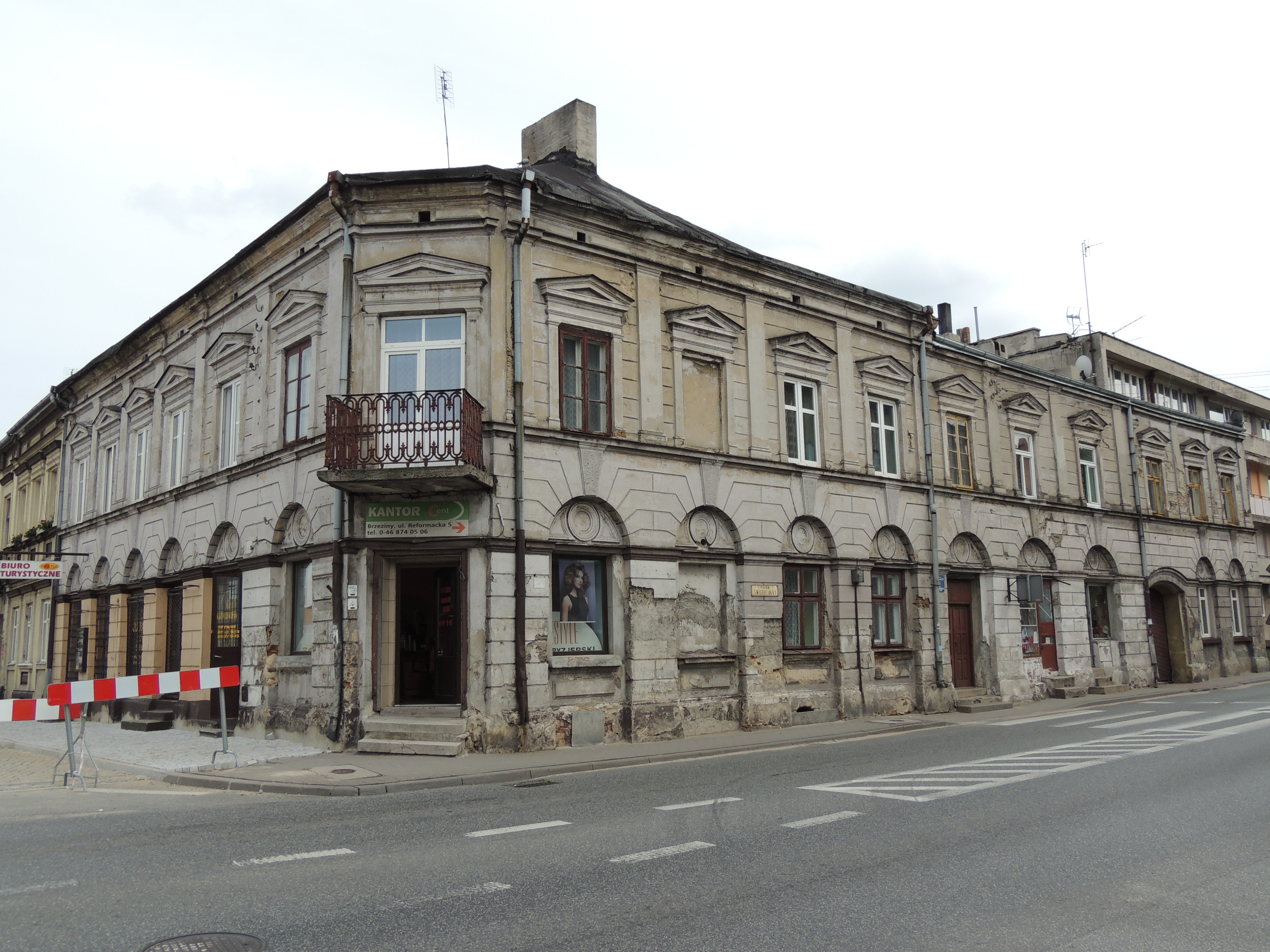 Kamienica z oficyną, 1885 ul. Św. Anny 1, Brzeziny, miasto 06.1984.